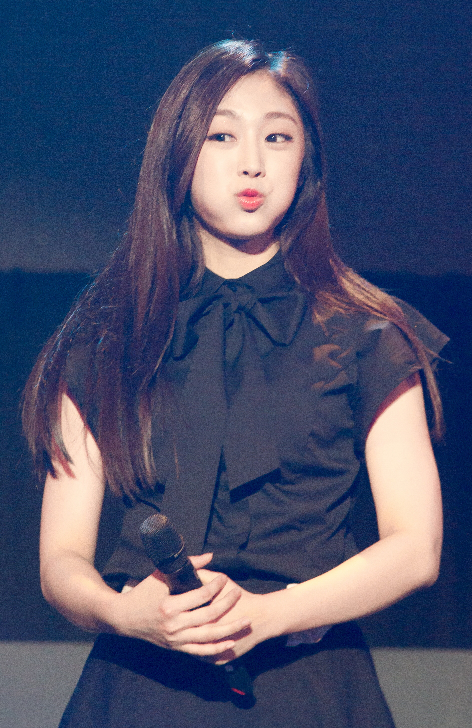 160715 러블리즈 K-creative festival 서지수